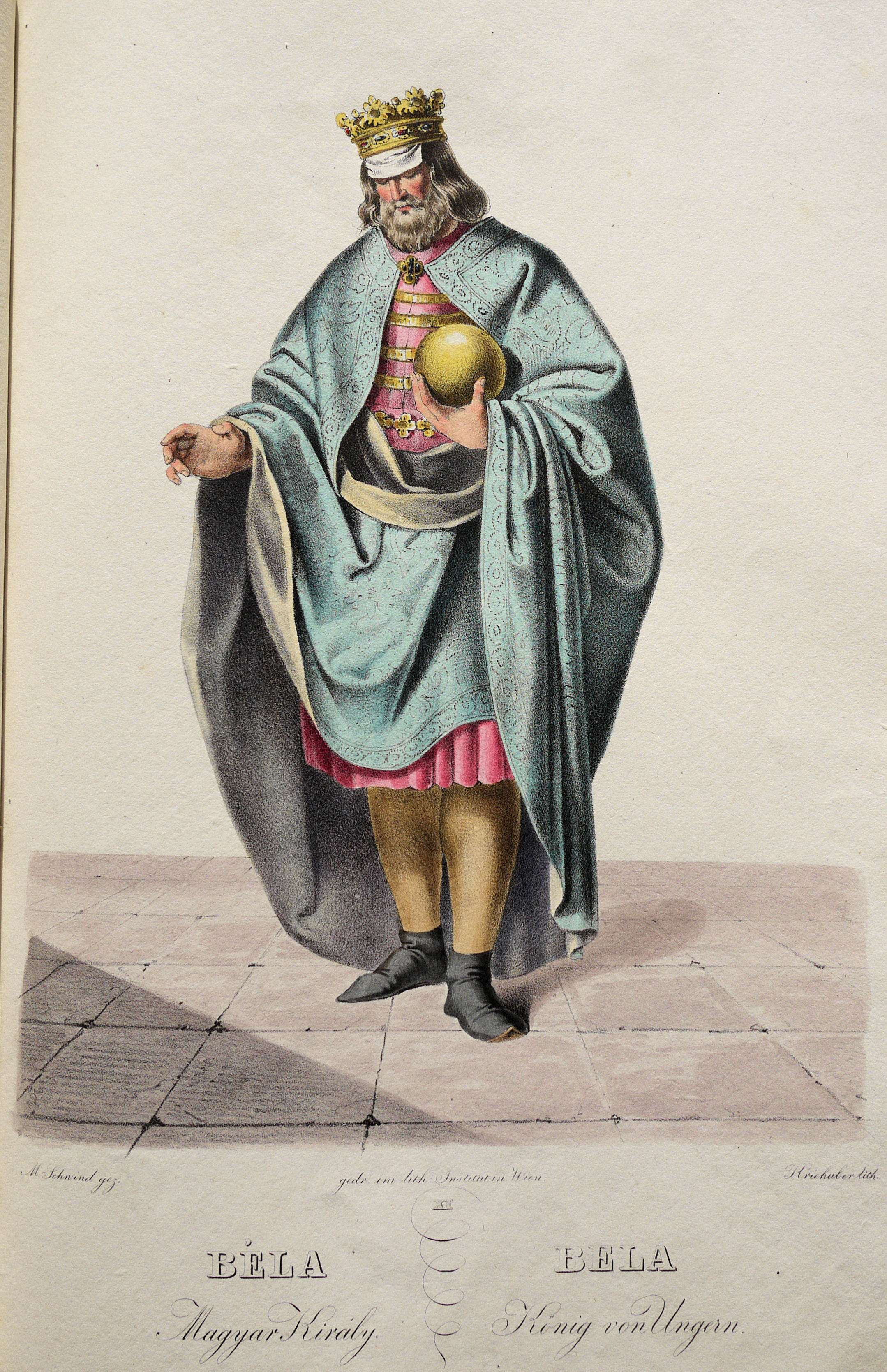 Béla II. (1110-1141), König von Ungarn etc. Lithographie von Josef Kriehuber nach einer Zeichnung von Moritz von Schwind aus Ungerns Erste Heerführer Herzoge und Koenige In einer Reihe von Bildnissen von Bela bis auf Seine Majestät Franz I. Kaiser Von Österreich König Von Ungern &c., &c. Wien : Lithographisches Institut ;ca. 1828.